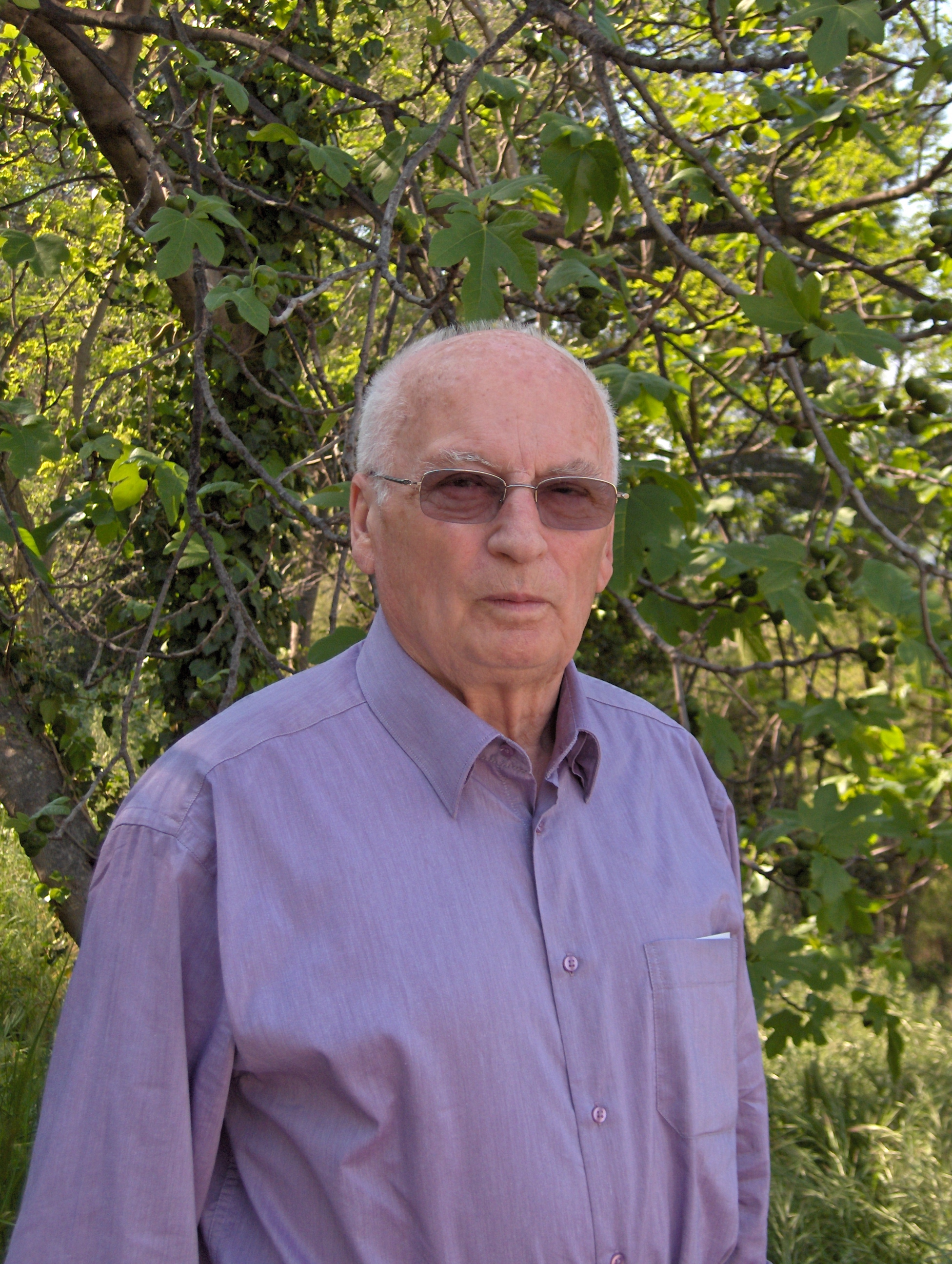 Le plus ancien des Maires de Fance